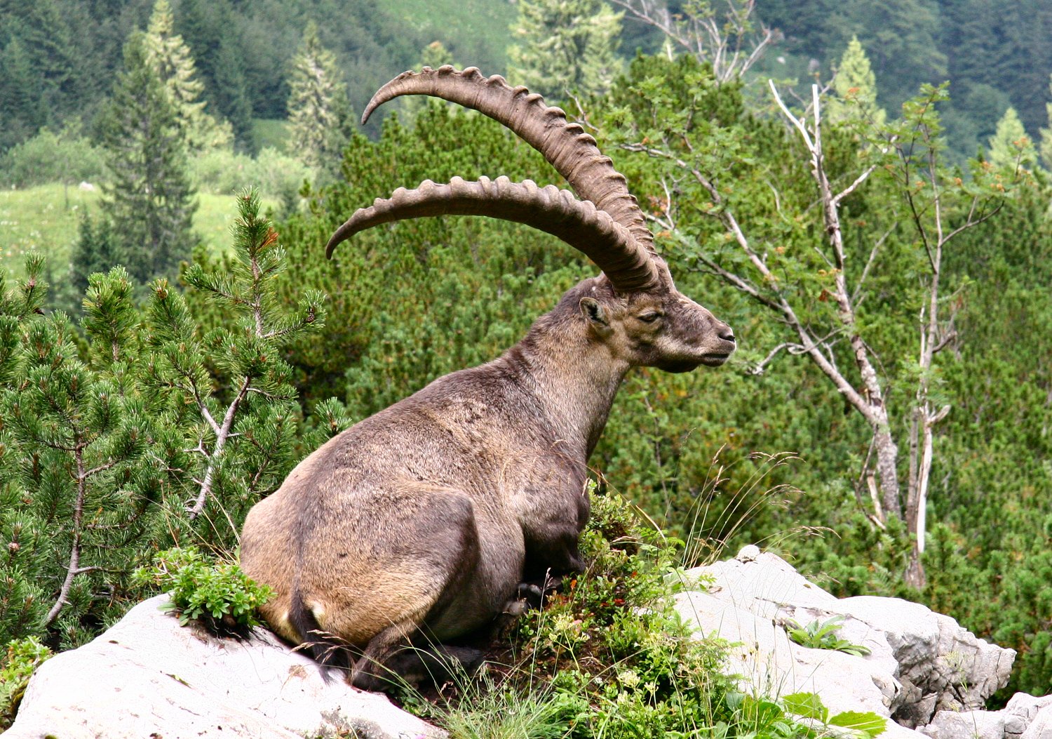 Beschreibung: Alpensteinbock Quelle: selbst fotografiert Datum: August 2006 Fotograf: Karsten Dörre (grizurgbg)